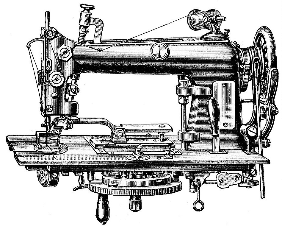 Ausschnitt aus File:Nähmaschinen-Tafel2.jpg